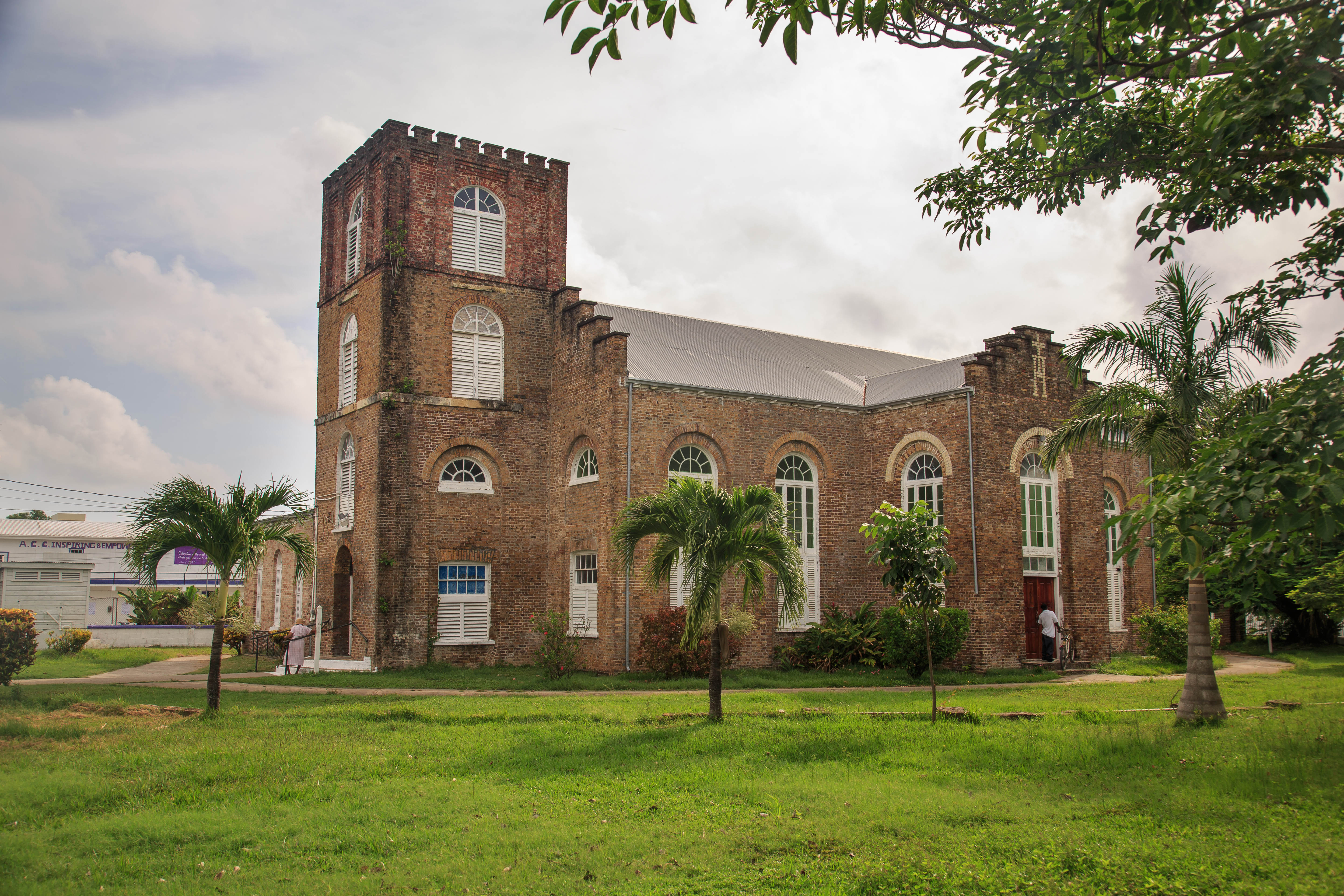 ProjectBelize-12